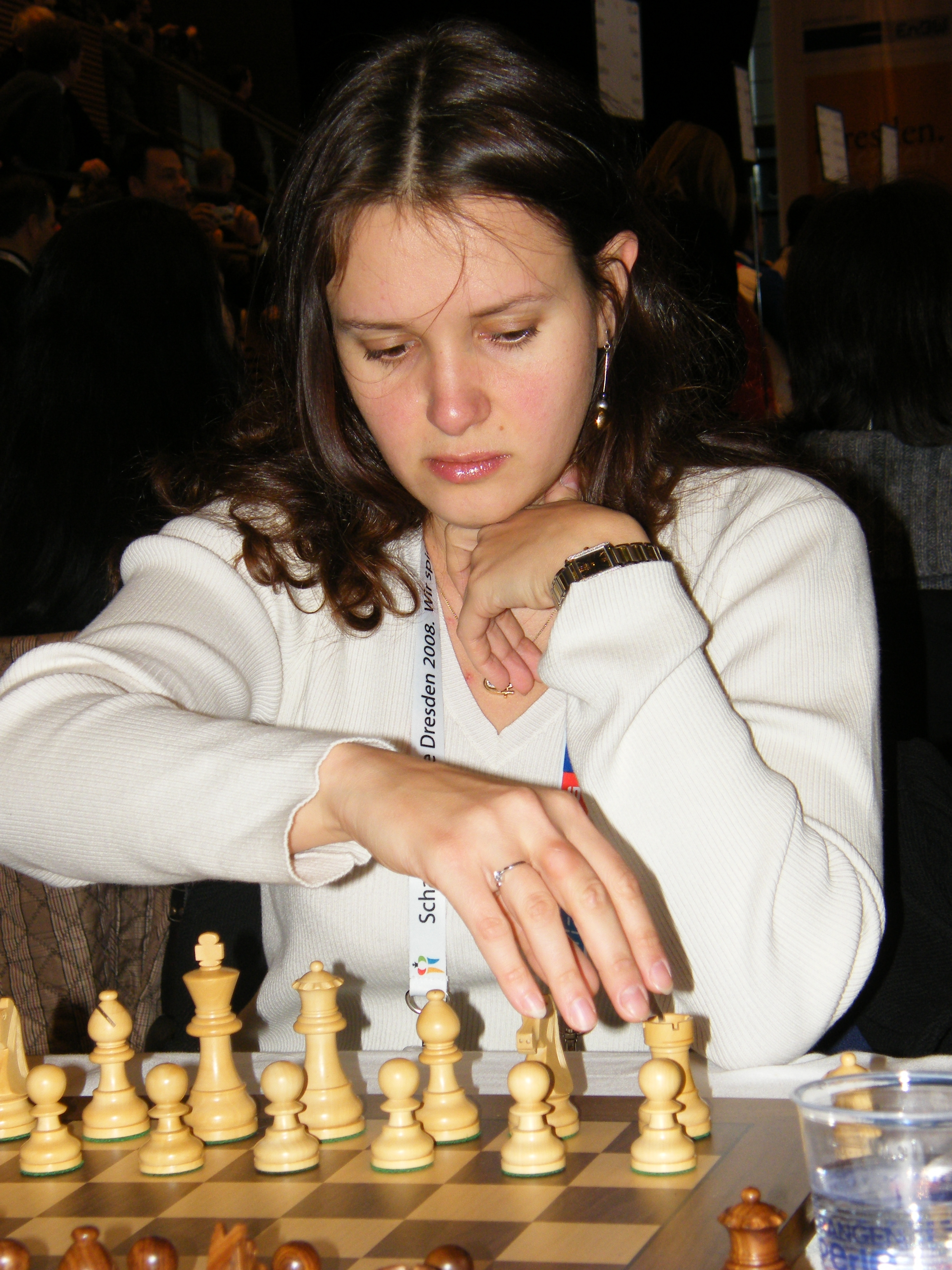 Anna Zatonskih bei der 38. Schacholympiade in Dresden 2008